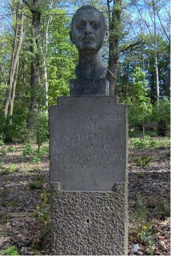 Pomníček Otakara Ostrčila (z roku 1941) v Soběslavi, u Nového rybníka, kam Mistr rád chodil na procházky